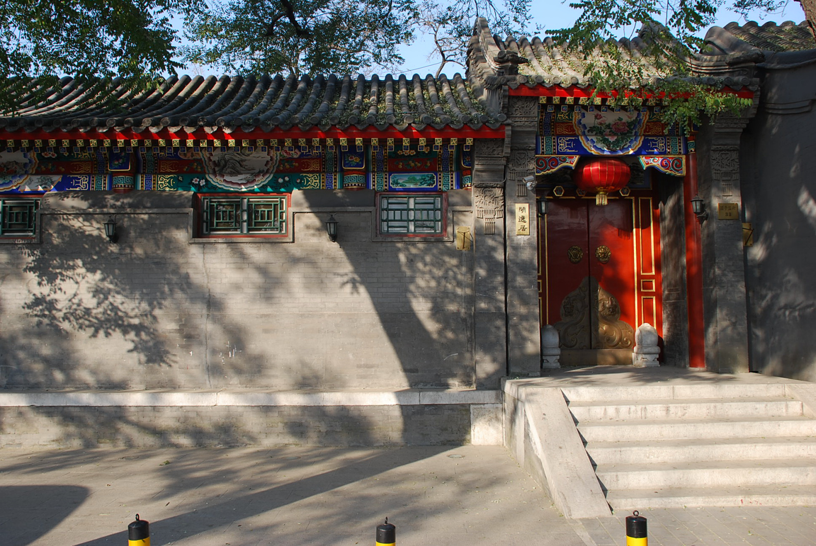 国子监一民居